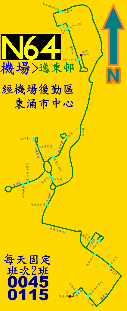 中文（香港）: 龍運巴士N64線的走線圖